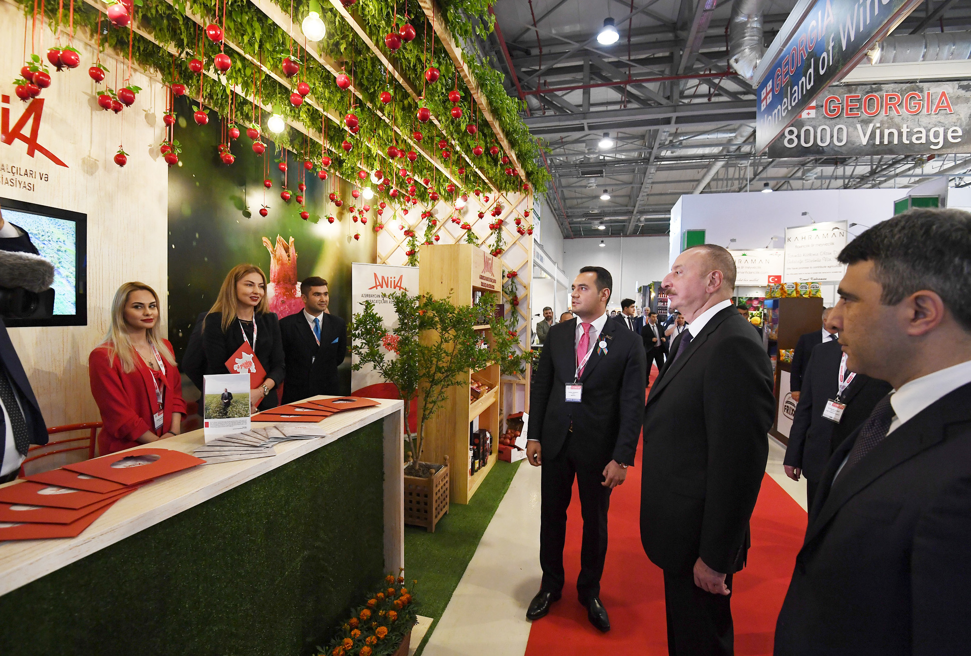 İlham Əliyev XXIV Azərbaycan Beynəlxalq Qida Sənayesi və XII Azərbaycan Beynəlxalq Kənd Təsərrüfatı sərgilərində